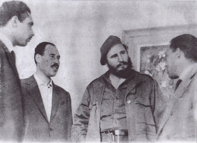 de gauche a droite Taybi Larbi, Fidel Castro, Mostéfa Merarda, Mahmoud Guennez (Janvier 1962 a la Havane)